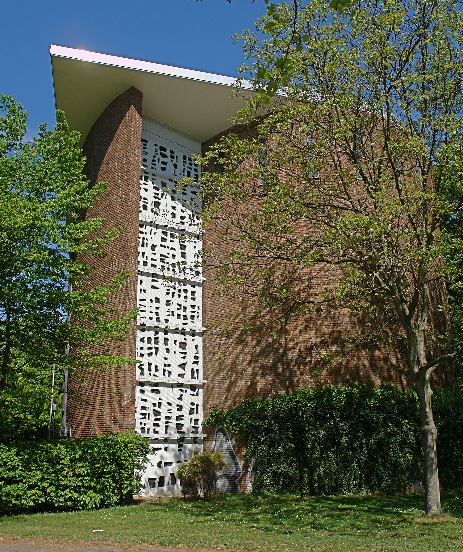 Kath. St.-Hedwig-Kirche der Pfarrgemeinde St. Raphael. Bremen, Kurt-Schumacher-Allee 62. Das abgebildete Objekt ist ein geschütztes Kulturdenkmal in der Freien Hansestadt Bremen, mit der Nr. 1175 beim Landesamt für Denkmalpflege registriert.